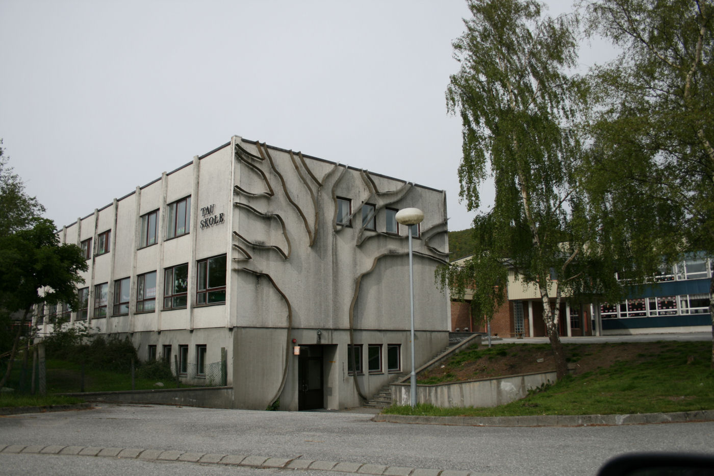 Tau skole